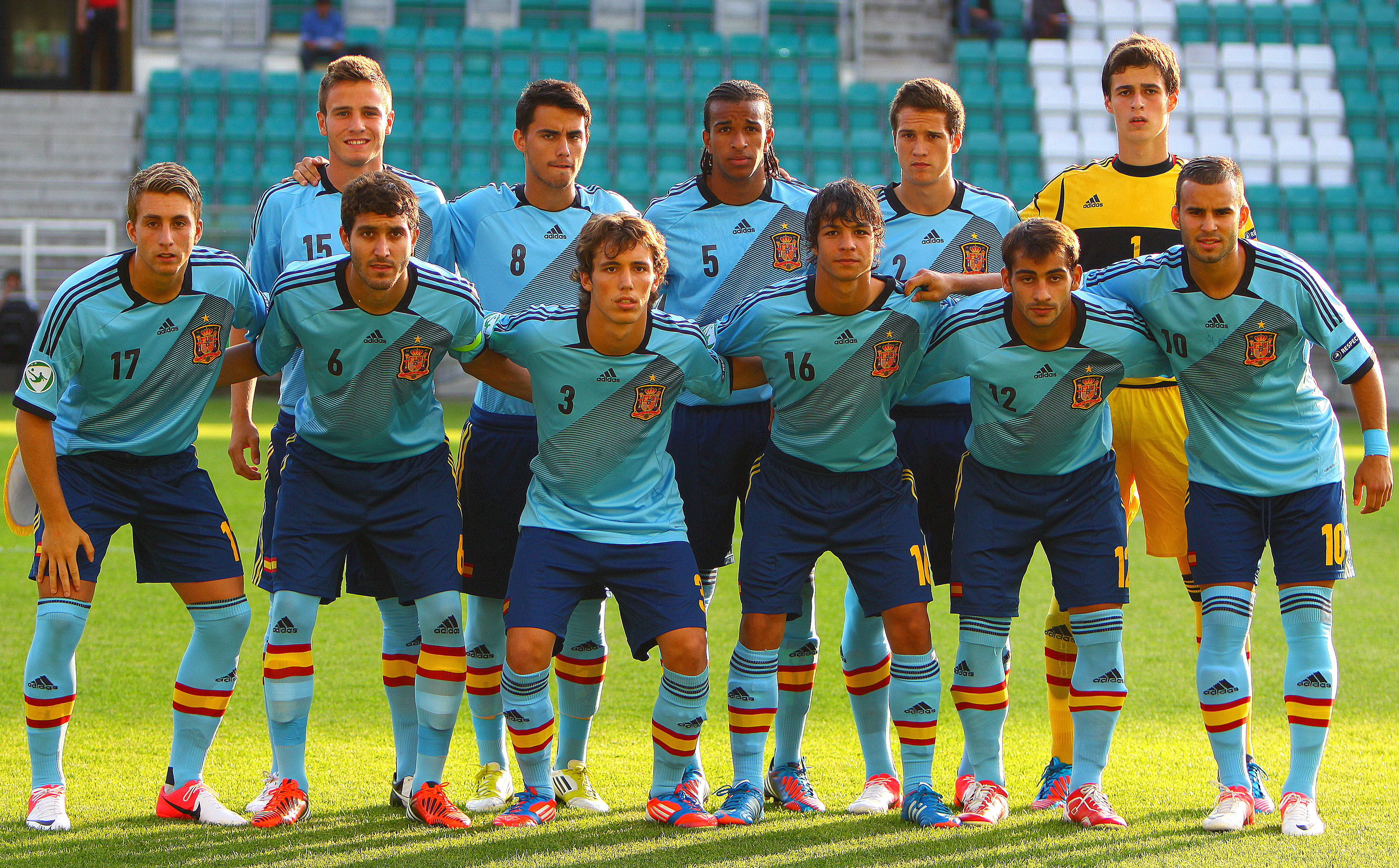 1-Kepa Arrizabalaga 2-Javi Manquillo 3-Alejandro Grimaldo 5-Derik Osede 6-Jose Campana 8-Suso 10-Jese Rodriguez 12-Joni 15-Saul Niguez 16-Oliver Torres 17-Gerald Deulofeu